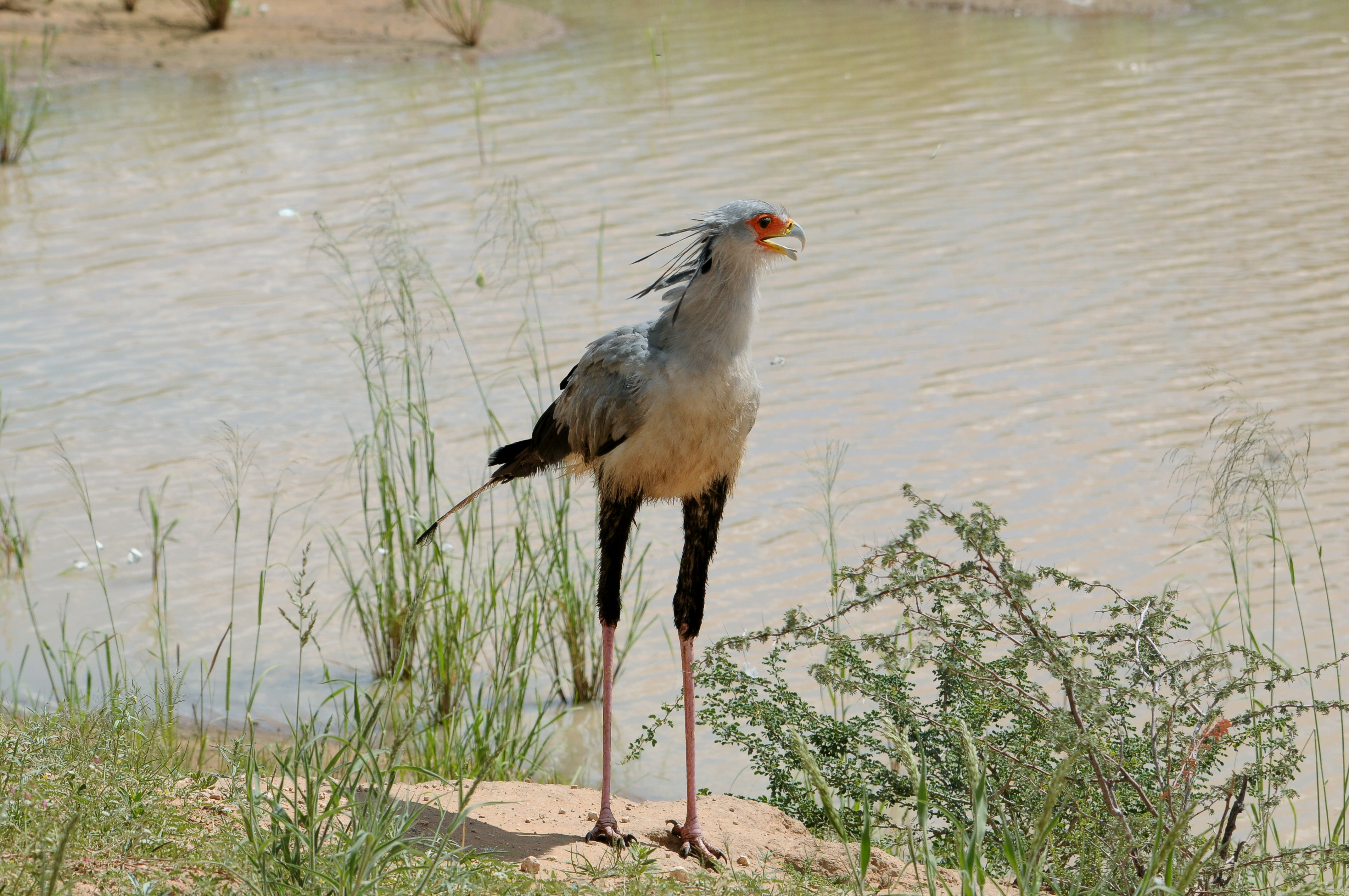 Secretary Bird Sagittarius serpentarius, Kalahara Nossop, Kgalagadi Transfrontier Park, South Africa